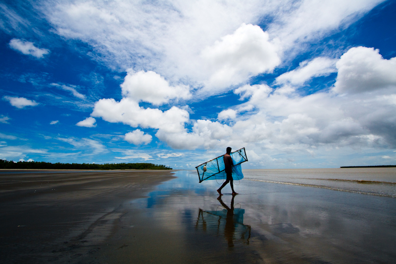 কুয়াকাটা সমুদ্র সৈকত।